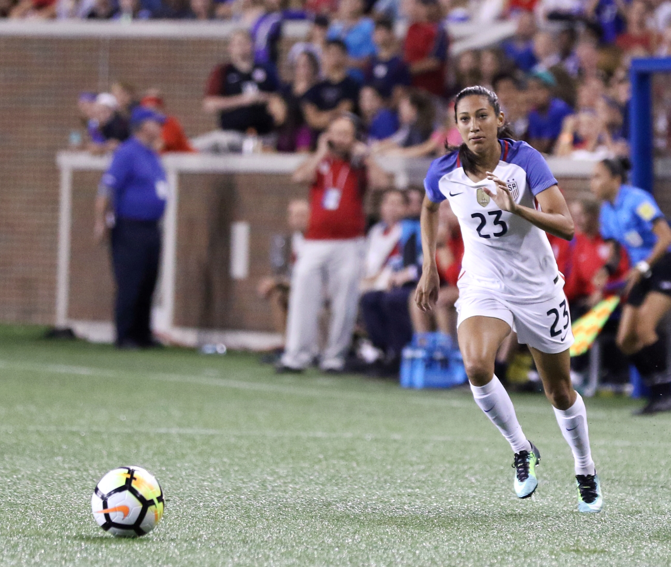 ChristenPress